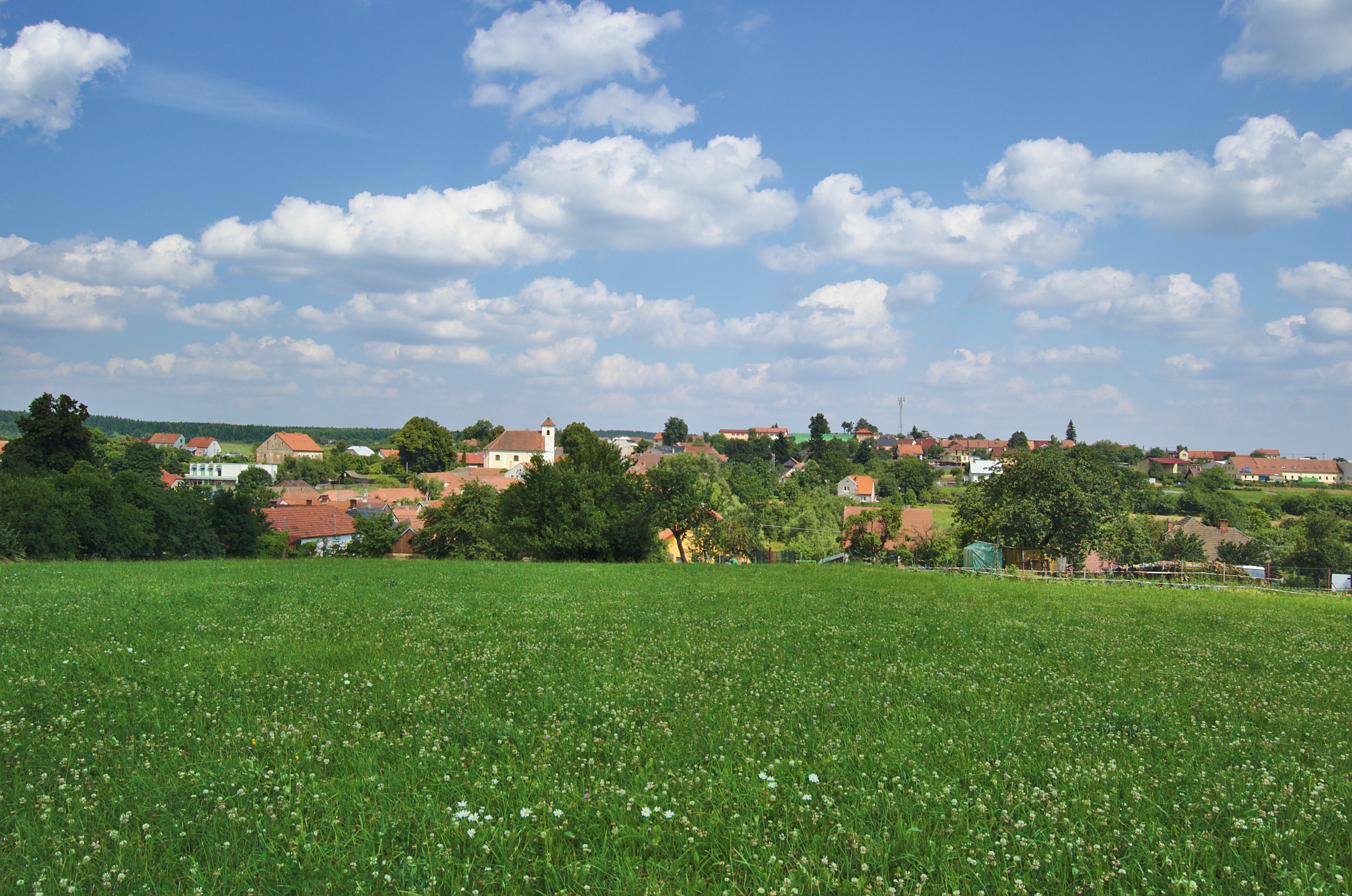 Pohled na Žďárnou od cesty na Valchov, okres Blansko